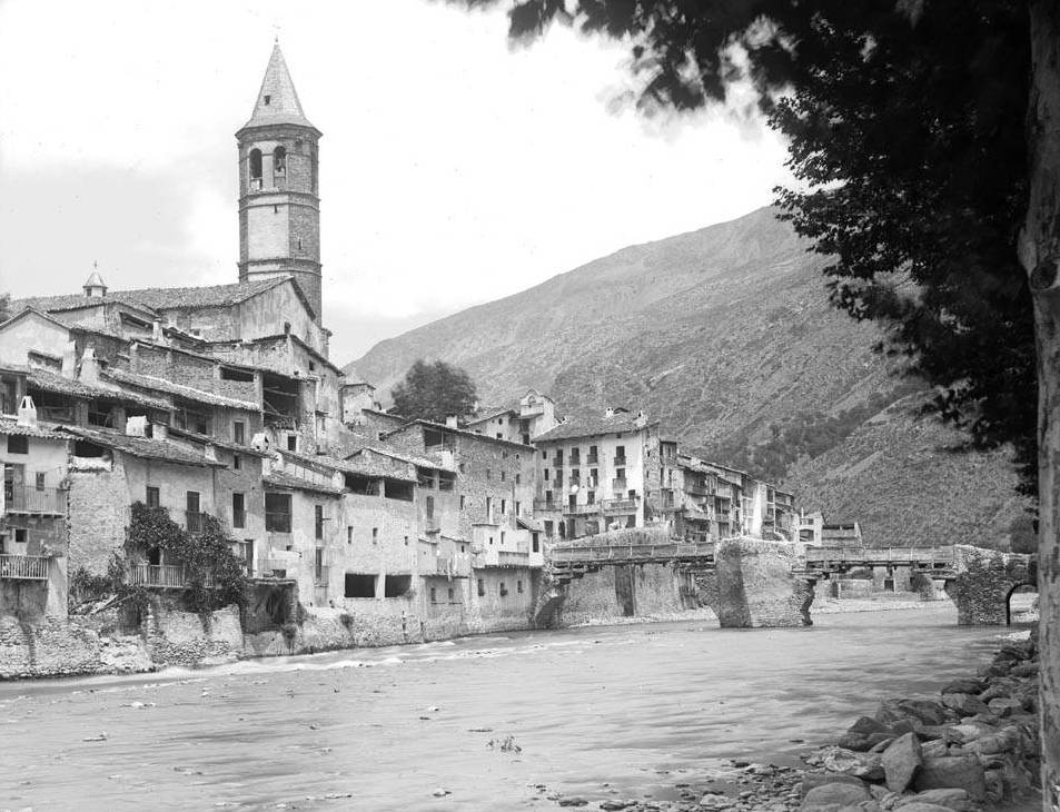 Imatge